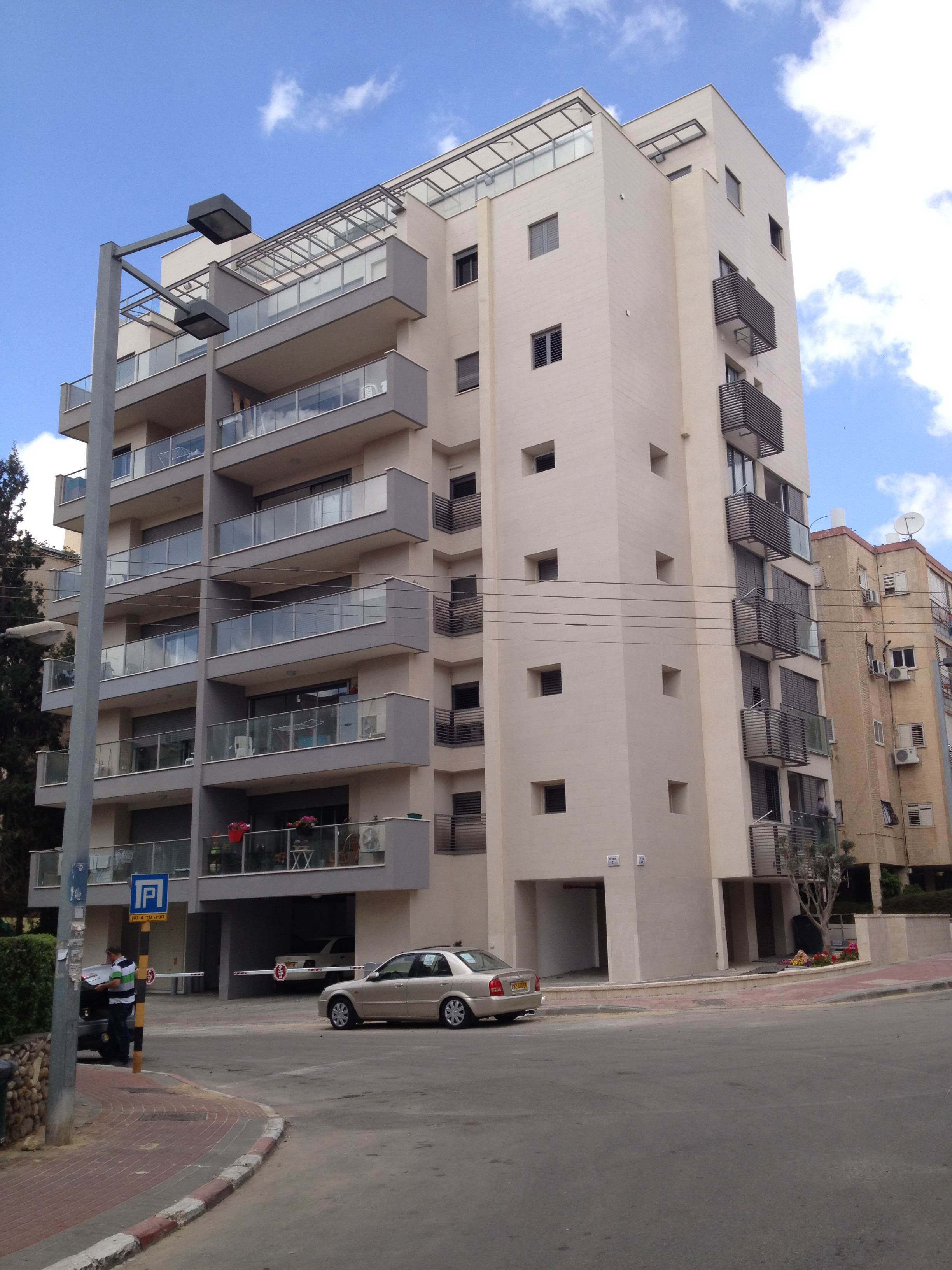 תל חי 25 ראשון לציון לאחר גמר עבודות תמ"א 38